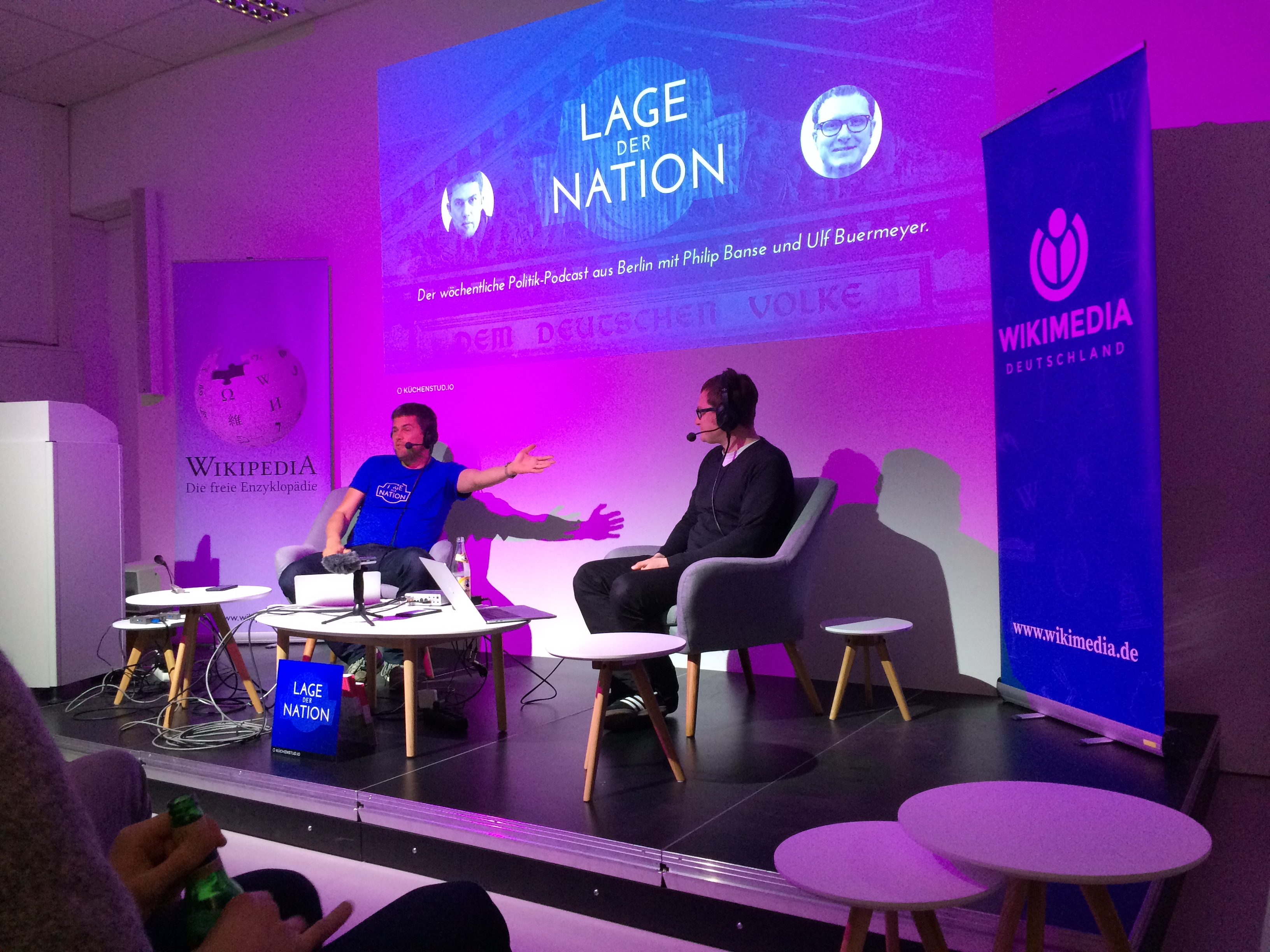 Die Macher des Podcasts "Lage der Nation" (Philip Banse, links, und Ulf Buermeyer) nahmen am 12. März 2017 in der Wikimedia in Berlin eine Folge ihres Audiopodcasts vor Publikum auf.